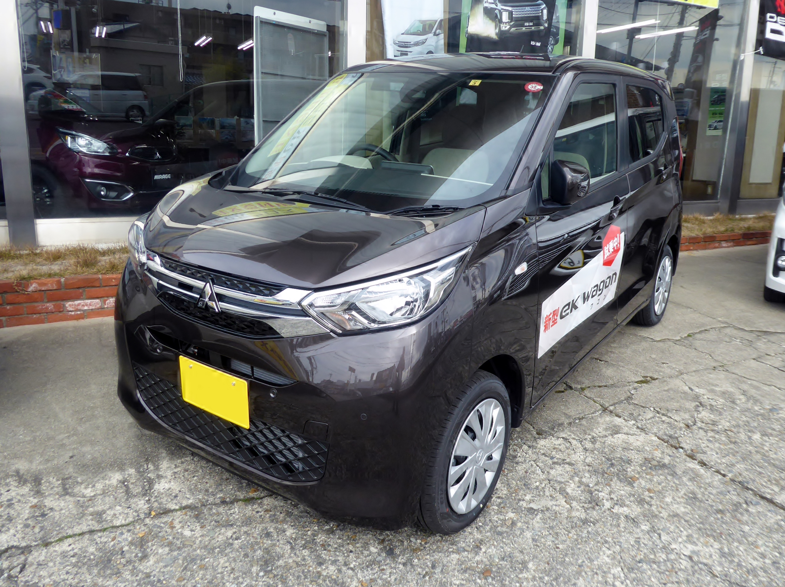 5BA-B33W-LTCE型三菱・eKワゴンG 2WDをフロントから撮影。